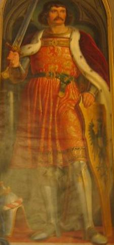 Albert d'Habsburg, Albert II d'Alemanya, I d'Hongria i Bohèmia, i V d'Àustria